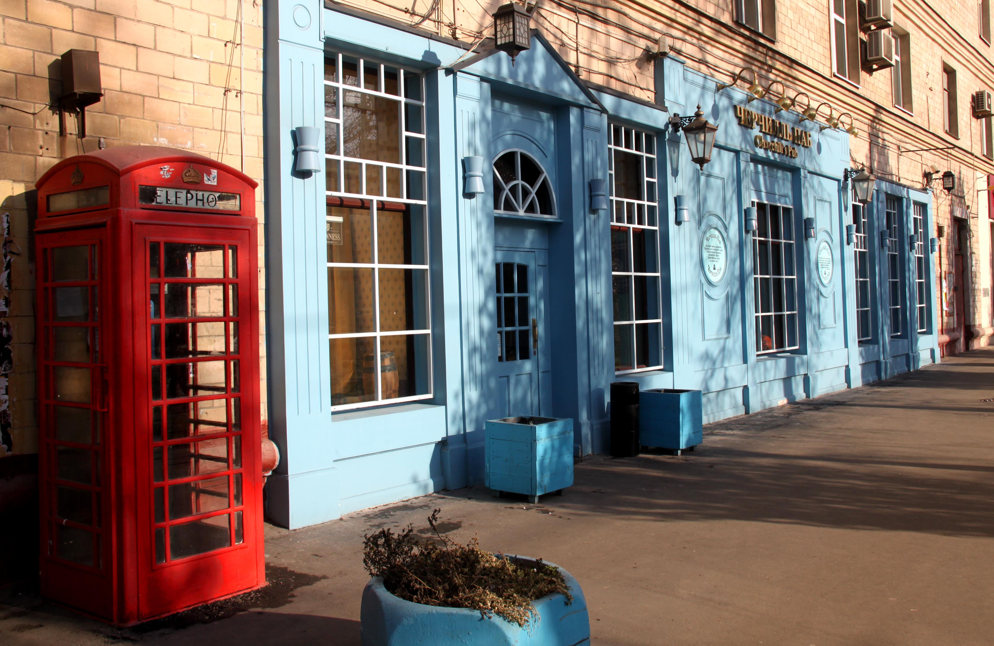 Стилизованный таксофон возле Черчилль Паба в Москве на Ленинградском проспекте, дом 66